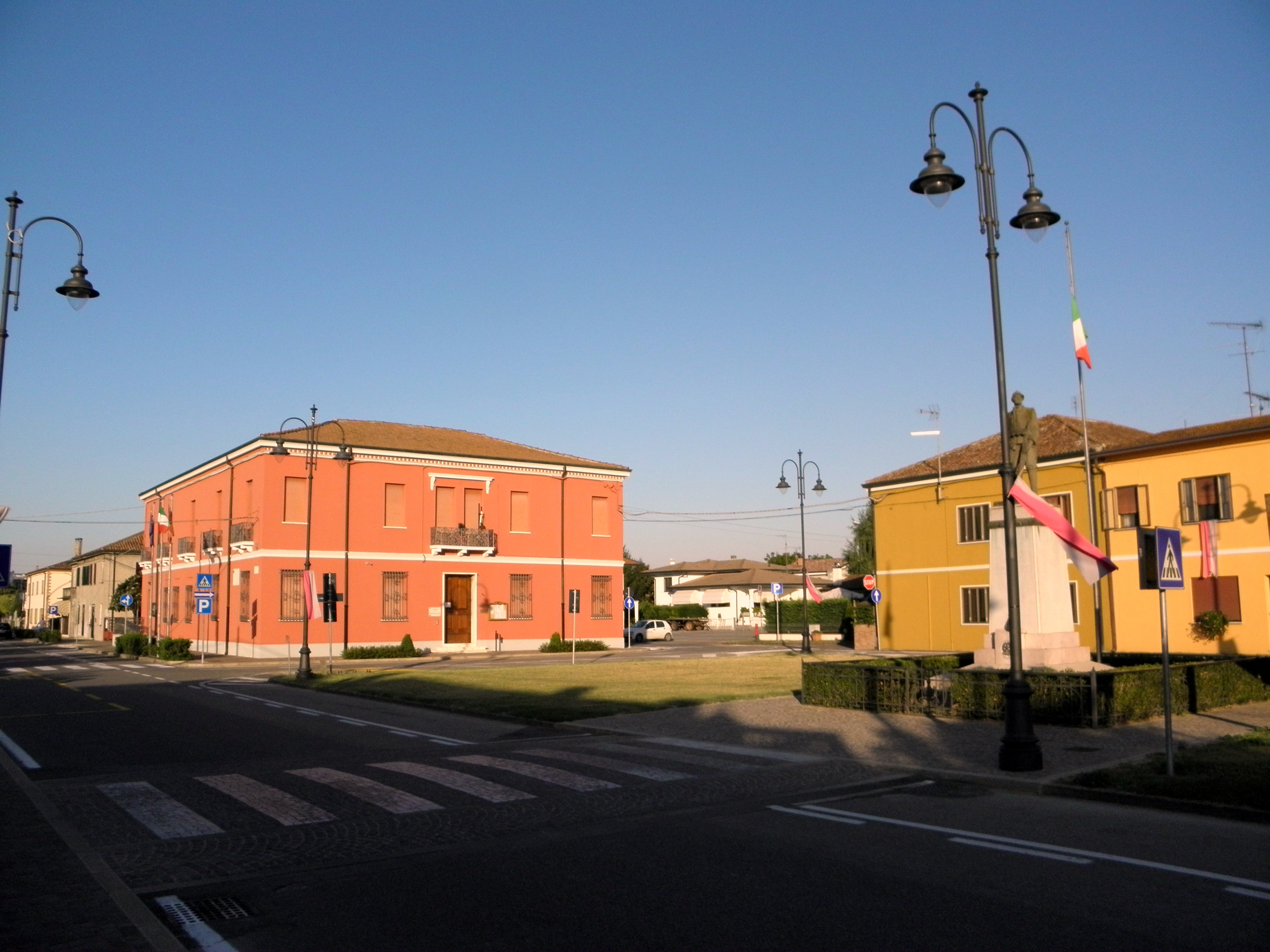 Bagnolo di Po, Piazza Guglielmo Marconi ed in secondo piano la palazzina sede del Municipio.